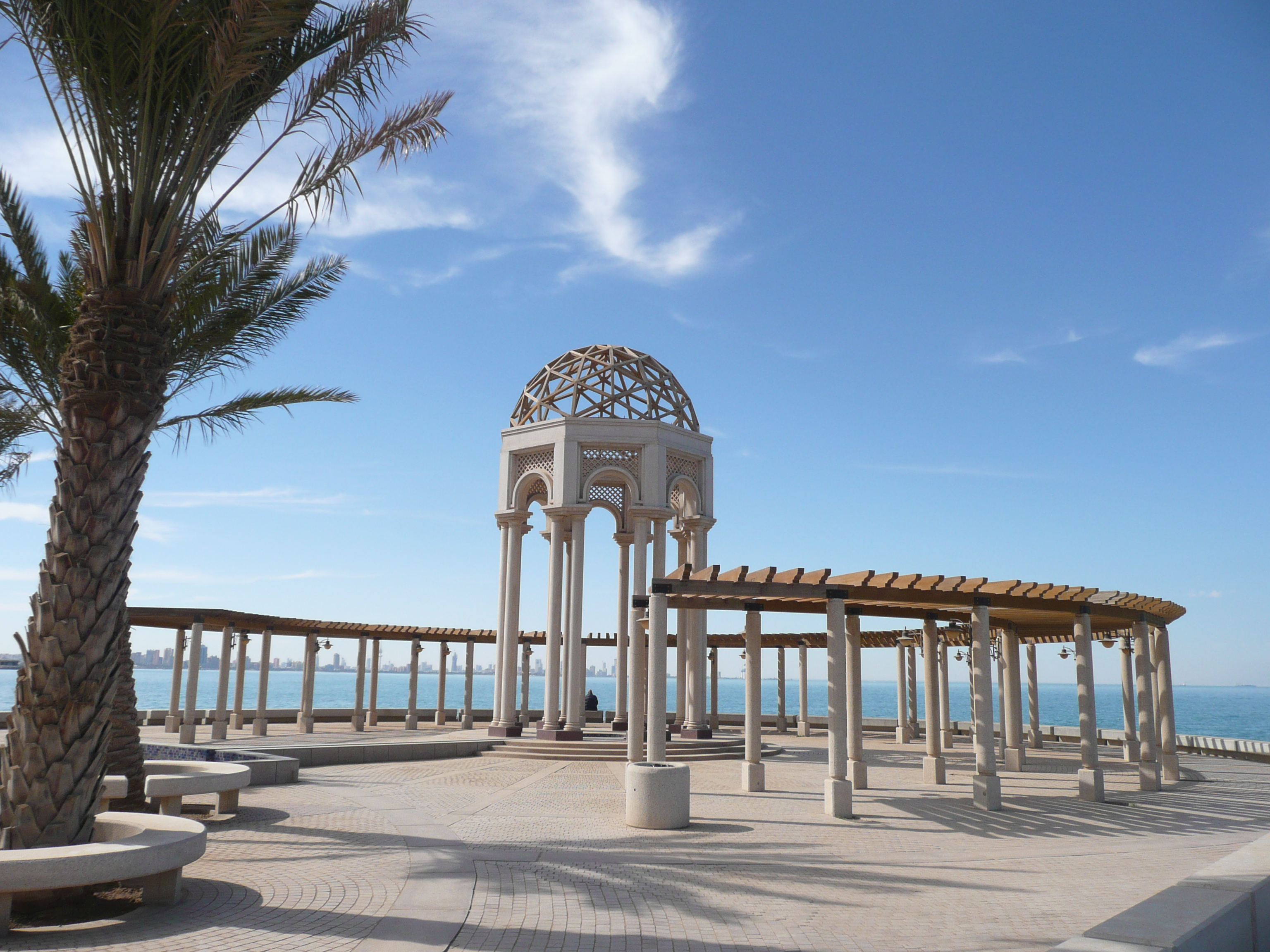 waterfront in Salmiya, Kuwait